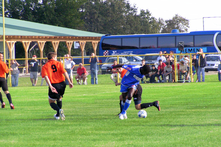 Nk Mraclin i NK Dinamo igraju prijateljsku utakmicu.